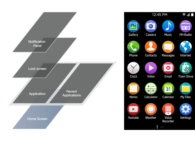 écran home